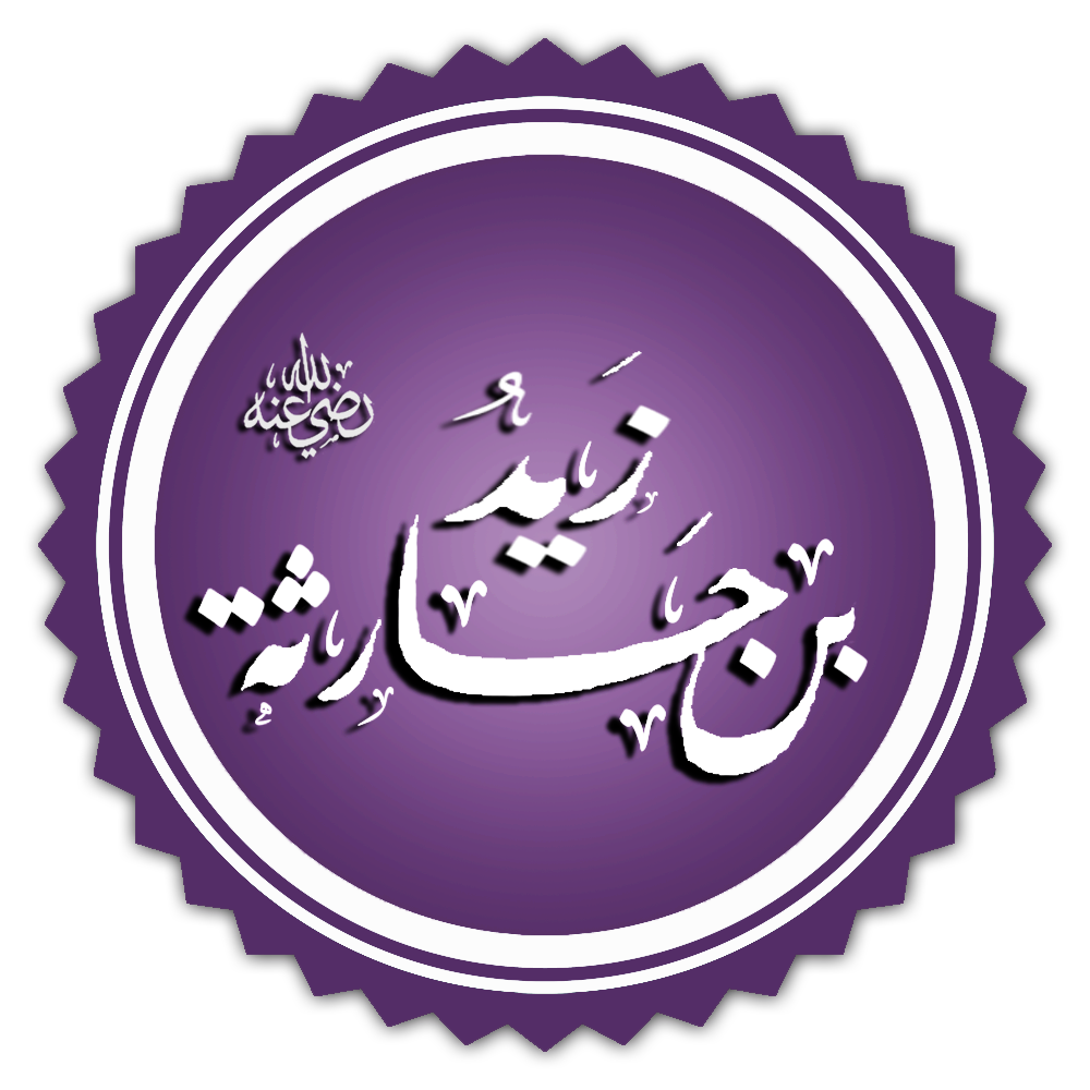 تخطيط اسم زيد بن حارثة رضي الله عنه